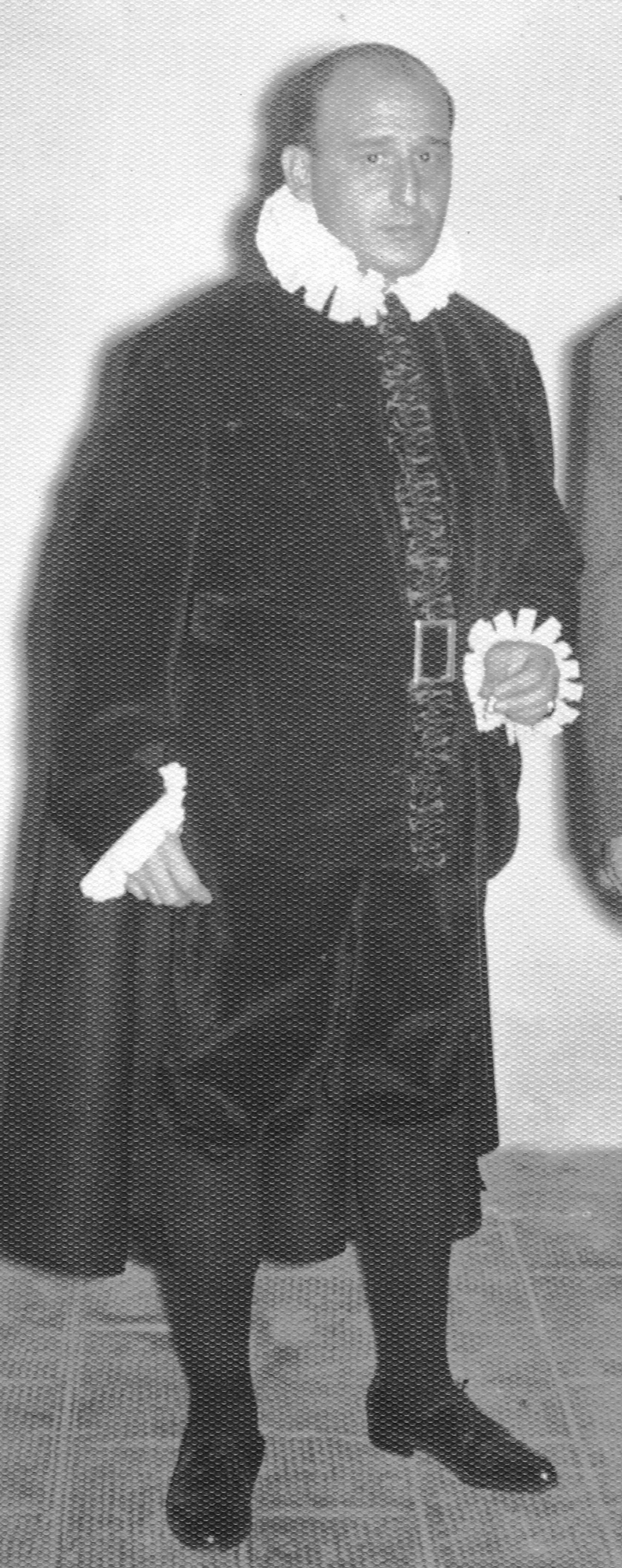 Francisco Cuadrado Narváez, en la noche del "Gran Desfile" del Real Centro Filarmónico de Córdoba, el 23 de Octubre de 1962.